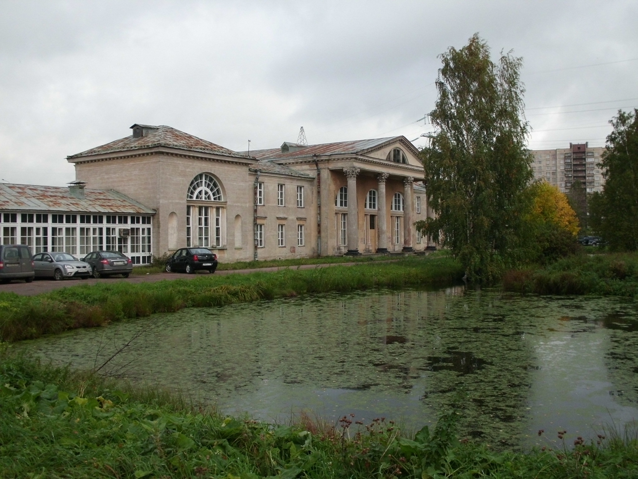 дача Безобразовых «Жерновка», сад с прудом